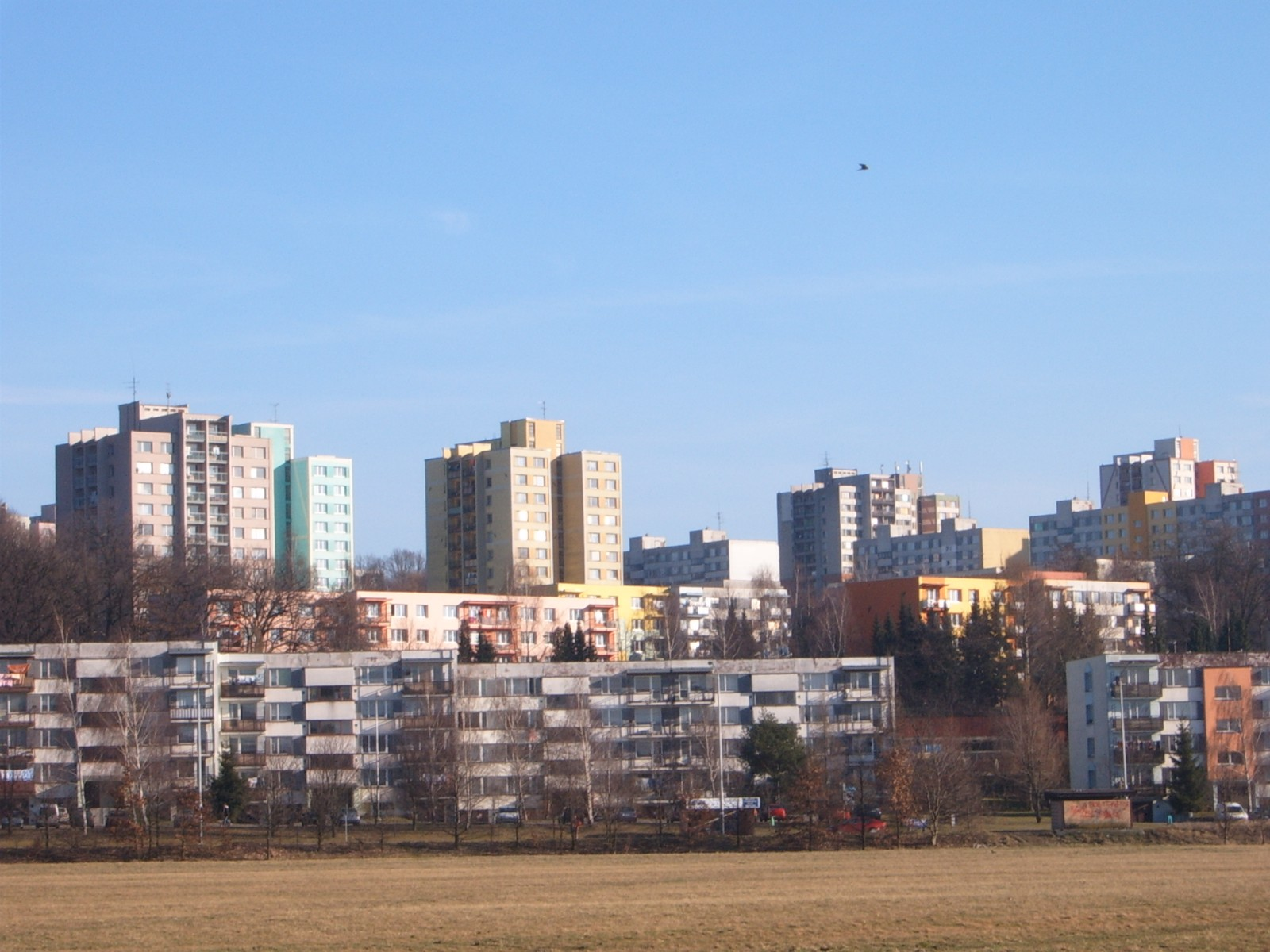 Výškovice